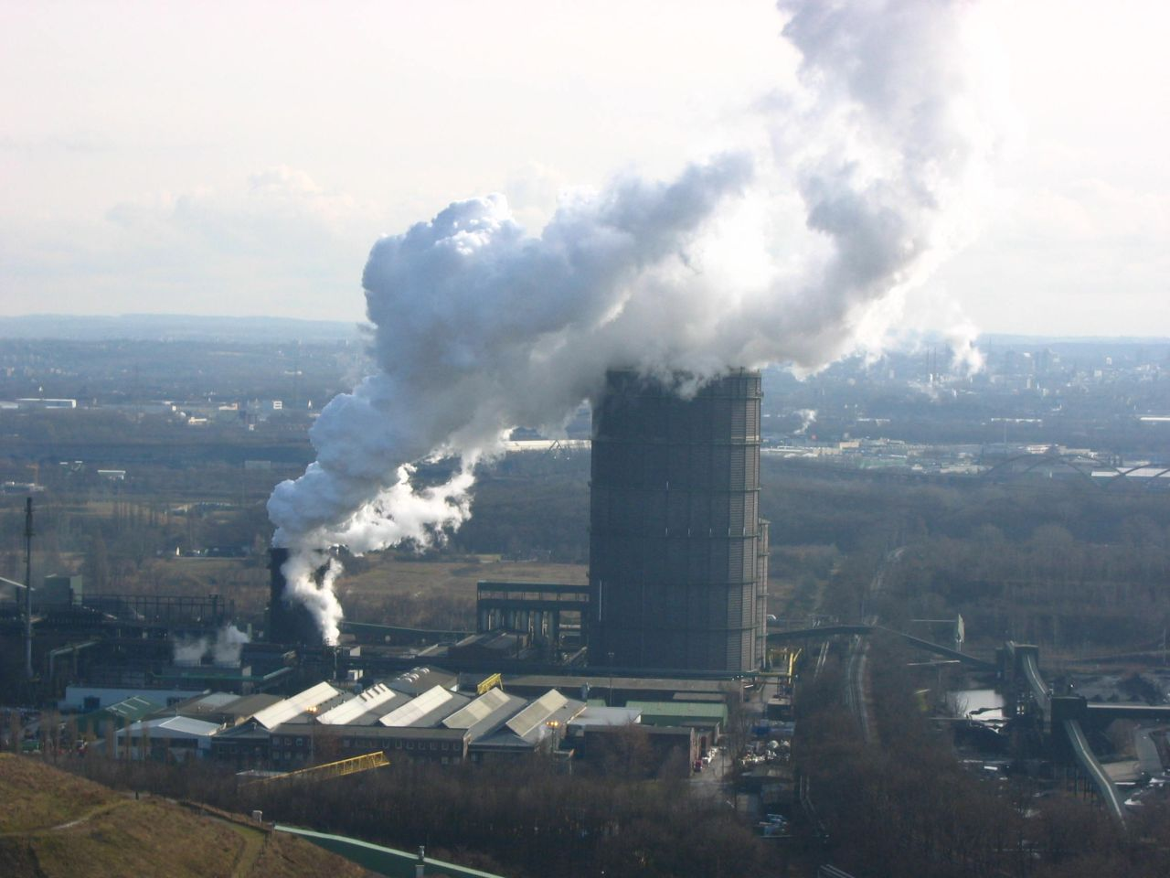 Kokerei Prosper, Scheibengasbehälter und Löschturm